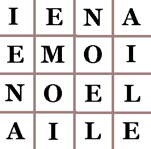 Carré symétrique formé de mots de 4 lettres.